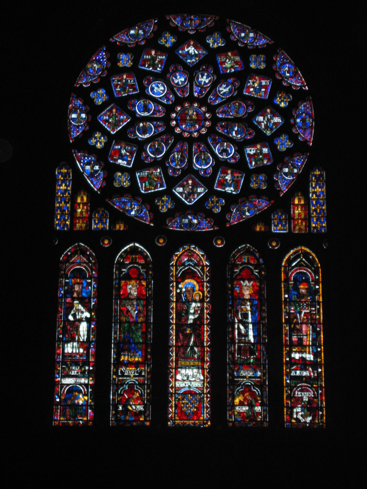 Rosace du portail nord de la cathédrale de Chartres